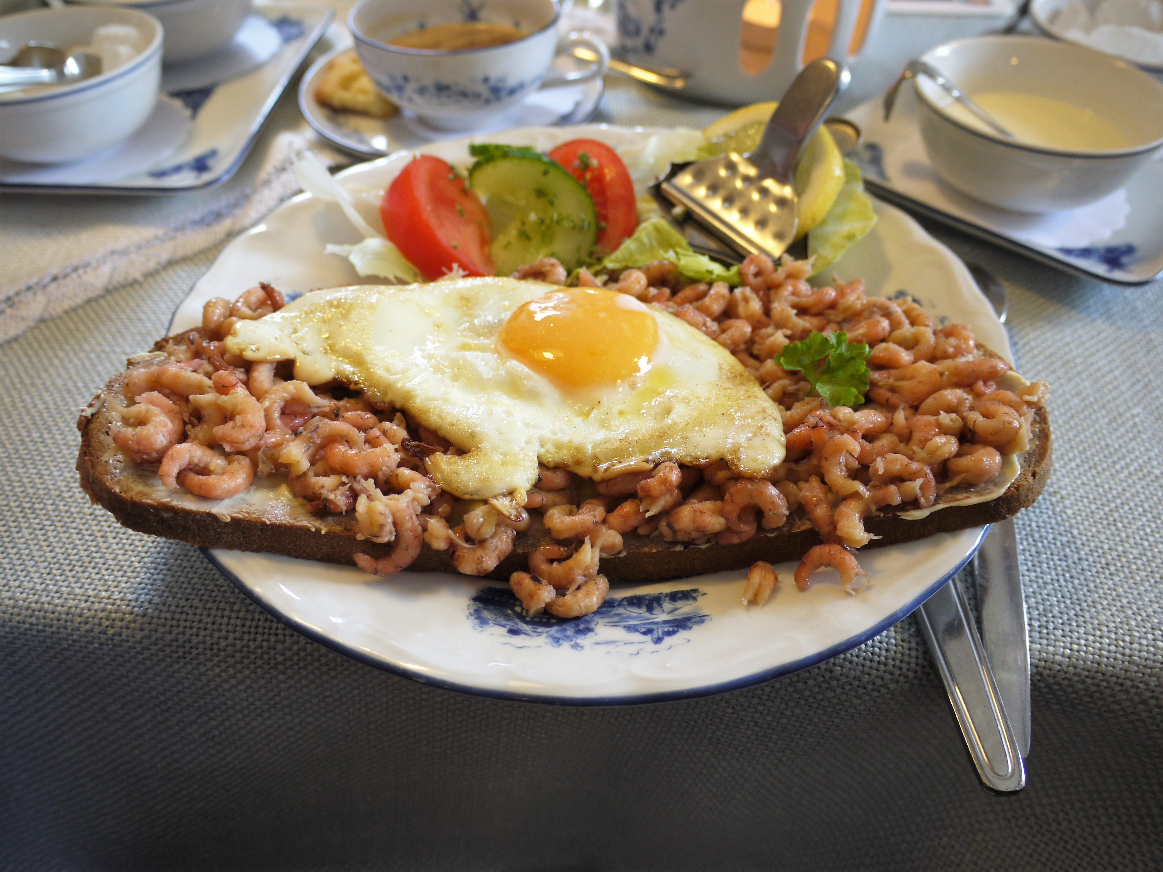 Krabbenbrot, mit Nordseekrabbenfleisch auf Graubrot, mit Spiegelei.Aufnahmeort: Gaststätte im Gebäudeensembe der Greetsieler Zwillingsmühlen in Greetsiel in Ostfriesland, Deutschland.